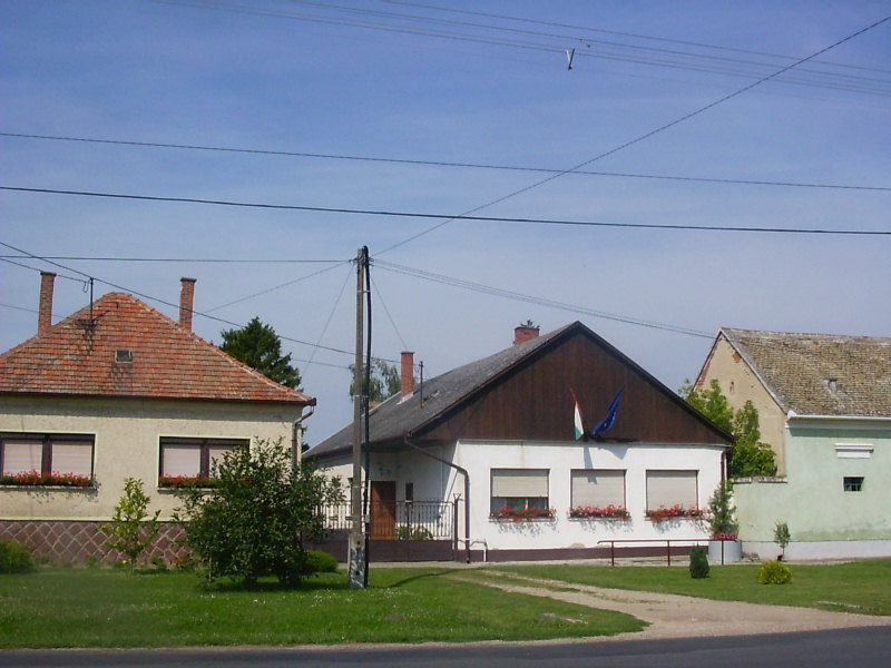 Bogyoszló községháza